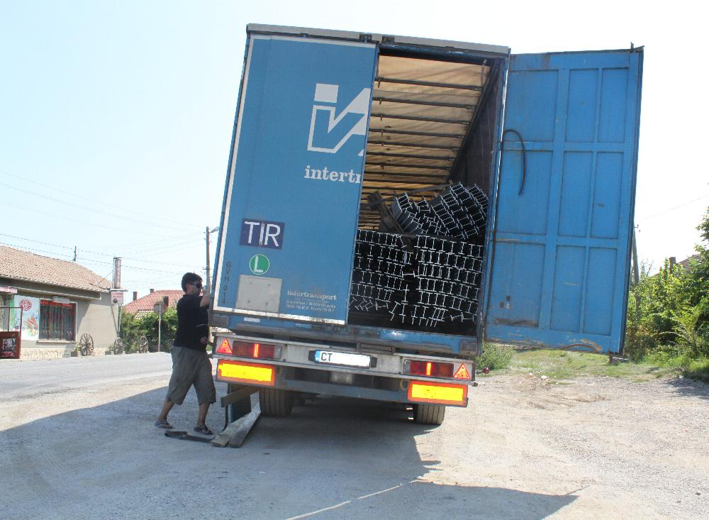 Ladungsverschiebung von Doppel-T Trägern auf einem bulgarischen LKW. Der Fahrer beginnt jetzt erst mit Ladungssicherung durch Spanngurte